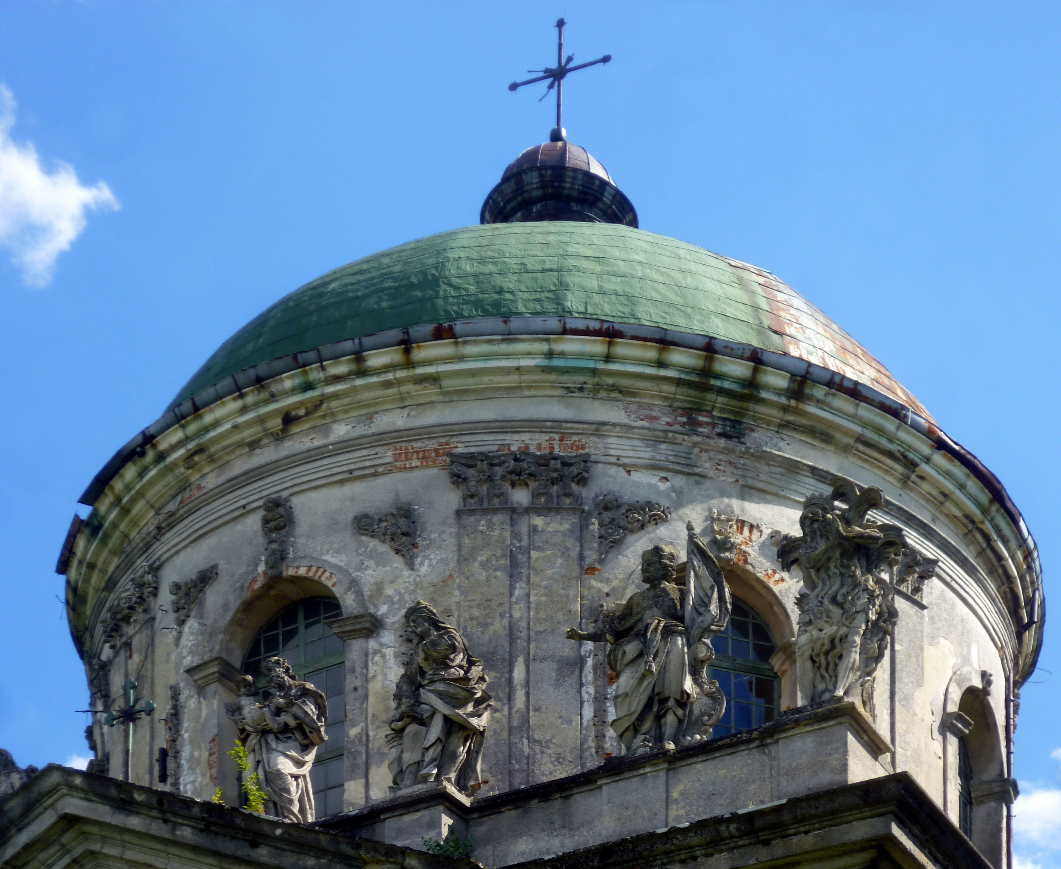 Костел Св. Йосифа (1763 р.) - баня - с.Підгірці Бродівський район Львівська область Україна